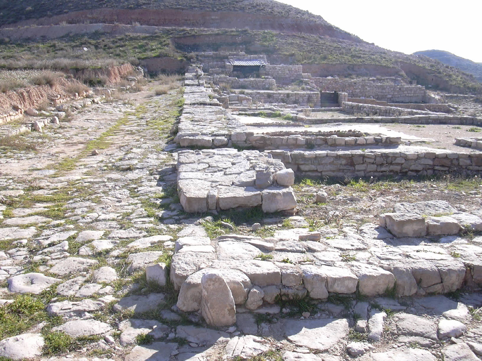 Colonia Victrix Iulia Lepida / Colonia Victrix Iulia Celsa (años 44 adC - 56) - Calle con Insula II a la izquierda